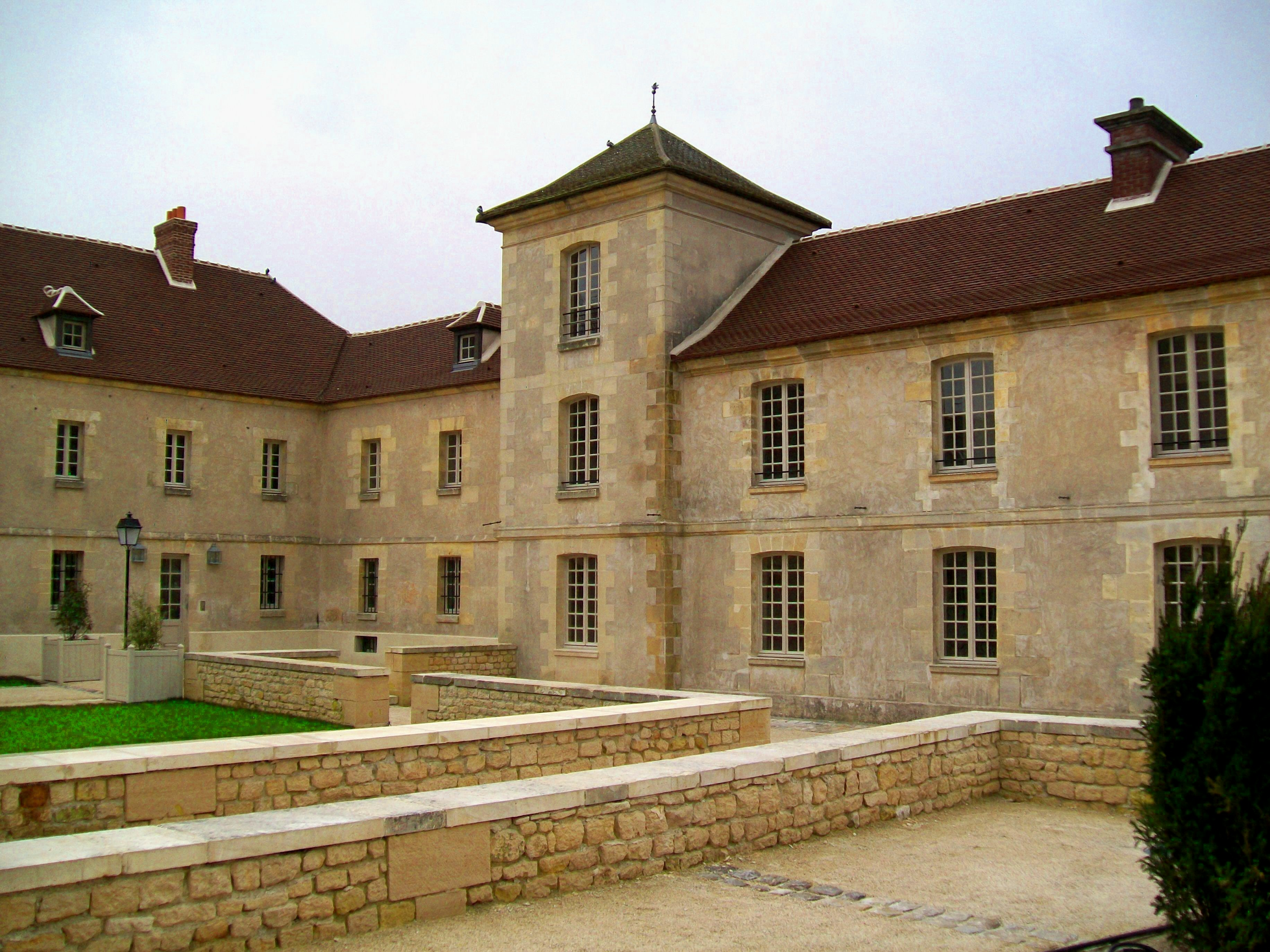 En 1752, l'hôpital a plus que doublé son emprise, au détriment des maisons d'artisans qui s'y trouvaient. Les extensions au sud étaient destinées aux malades mentaux et furent en partie utilisées comme prison jusqu'en 1914.